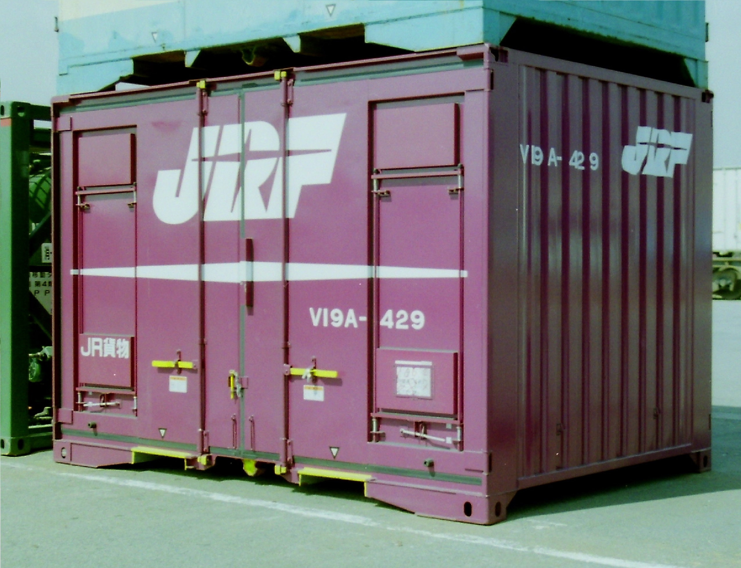 撮影地＝東京(タ)